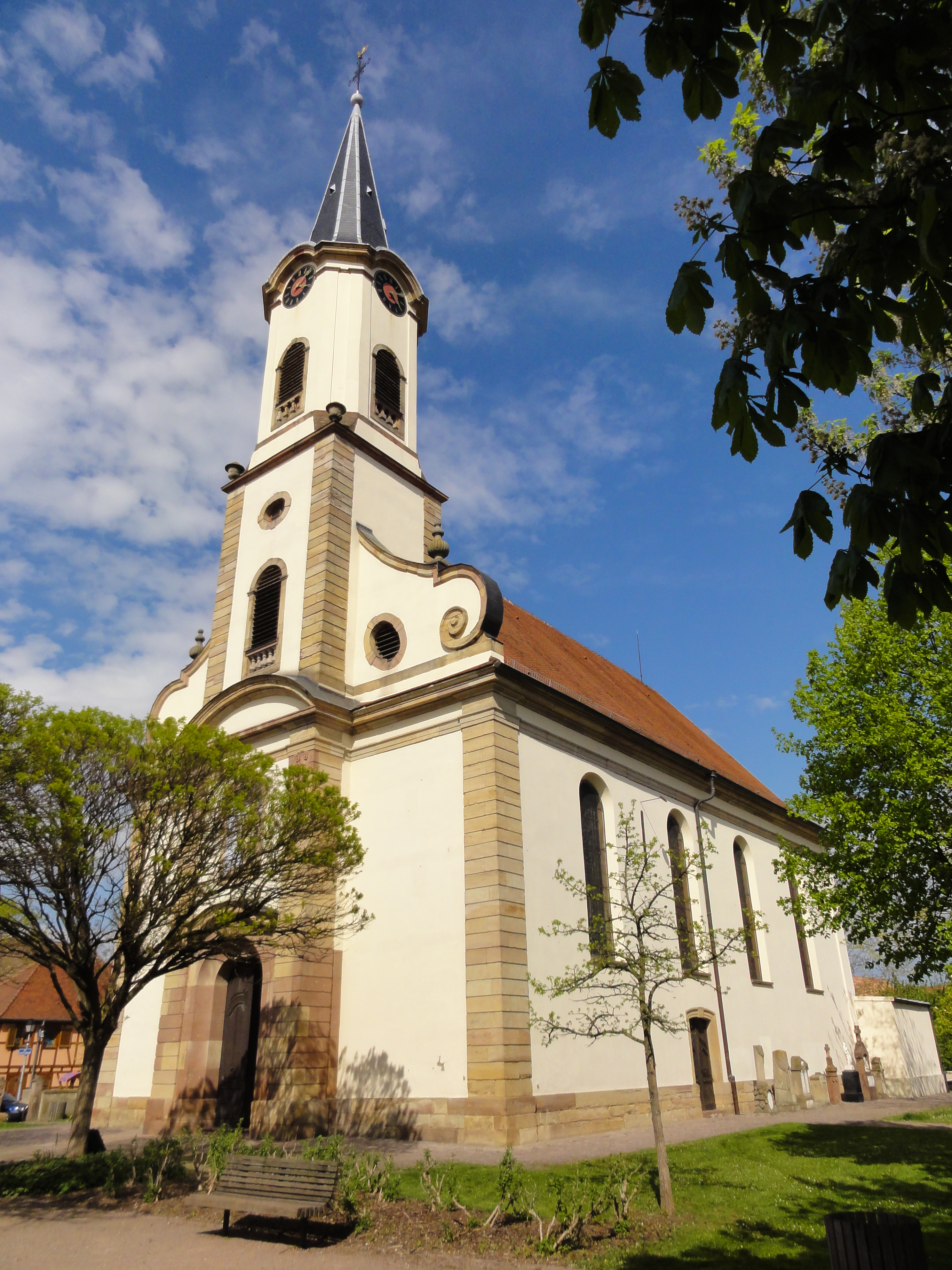 Alsace, Bas-Rhin, Église Saint-Maurice de Fegersheim (PA00132525, IA00023146).